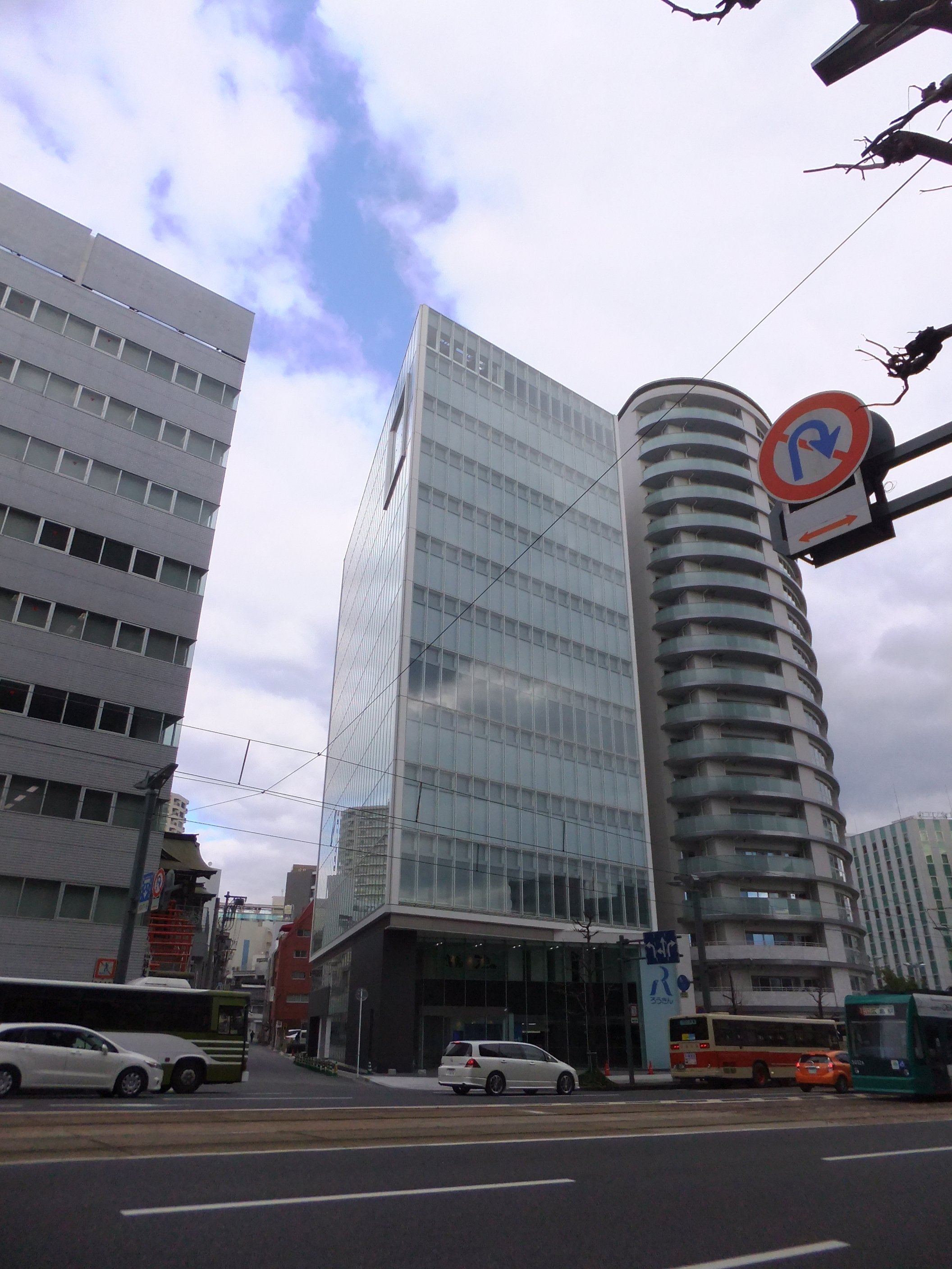 中国労働金庫本店